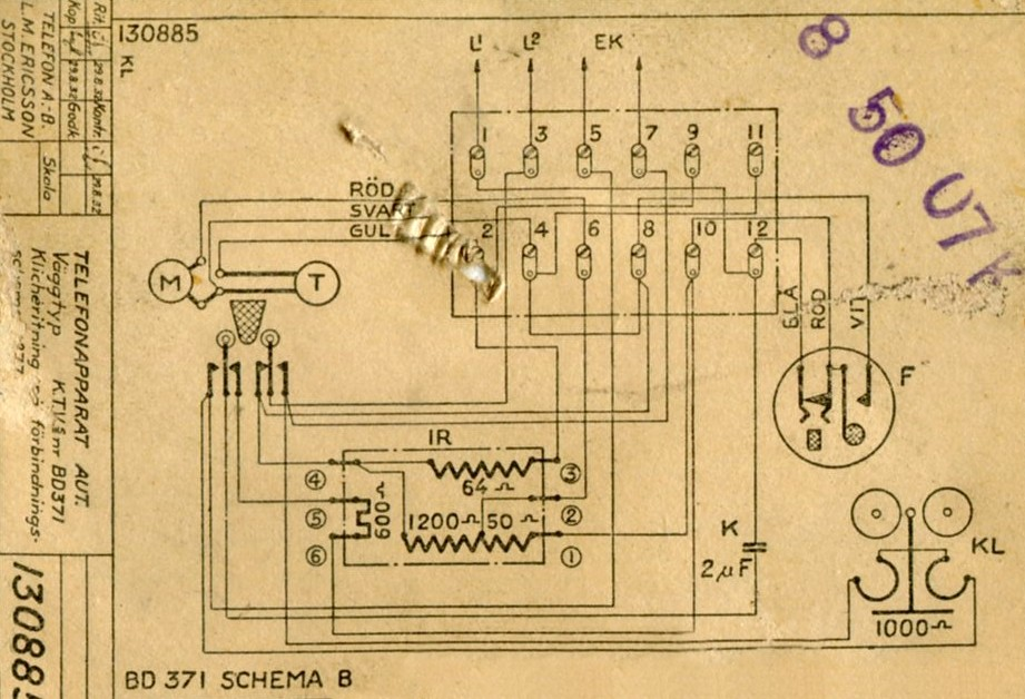 Bakelittelefon väggmodell 1932, kopplingsschema